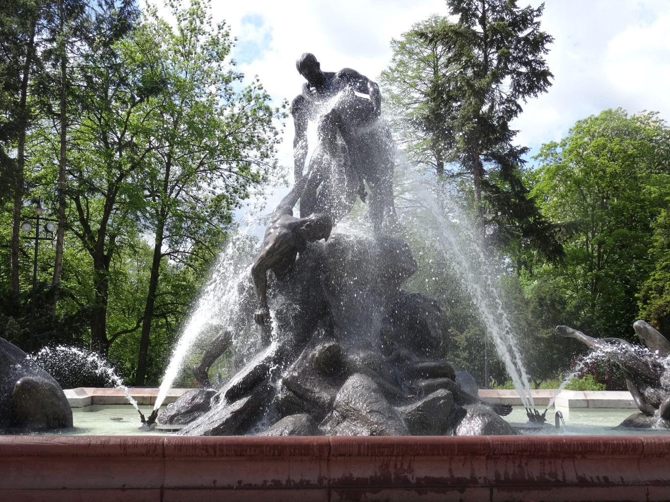 Fontanna Potop w Bydgoszczy (Ferdinand Lepcke, 1904-1643) zrekonstruowana w latach 2006-2014